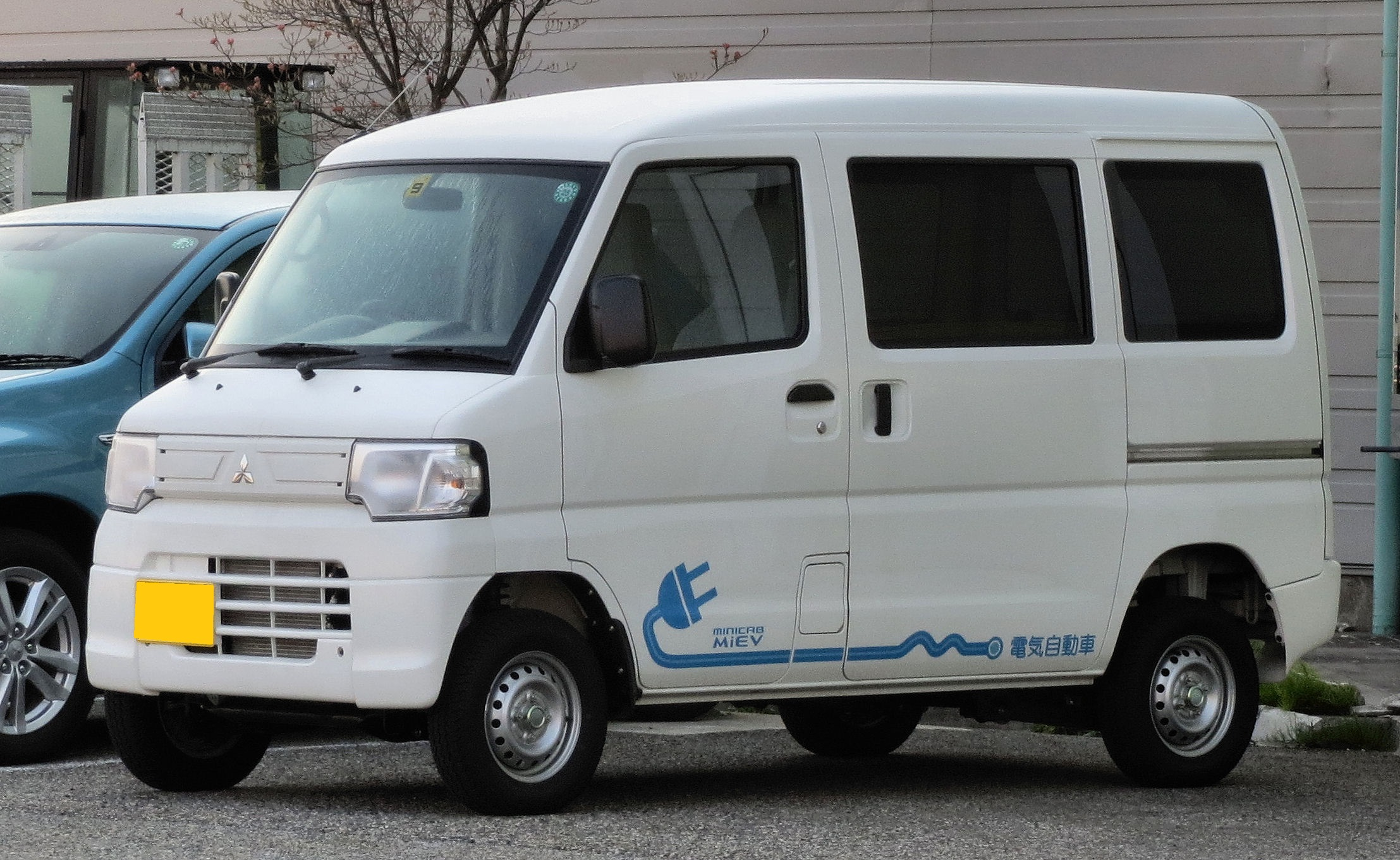 三菱・ミニキャブMiEV